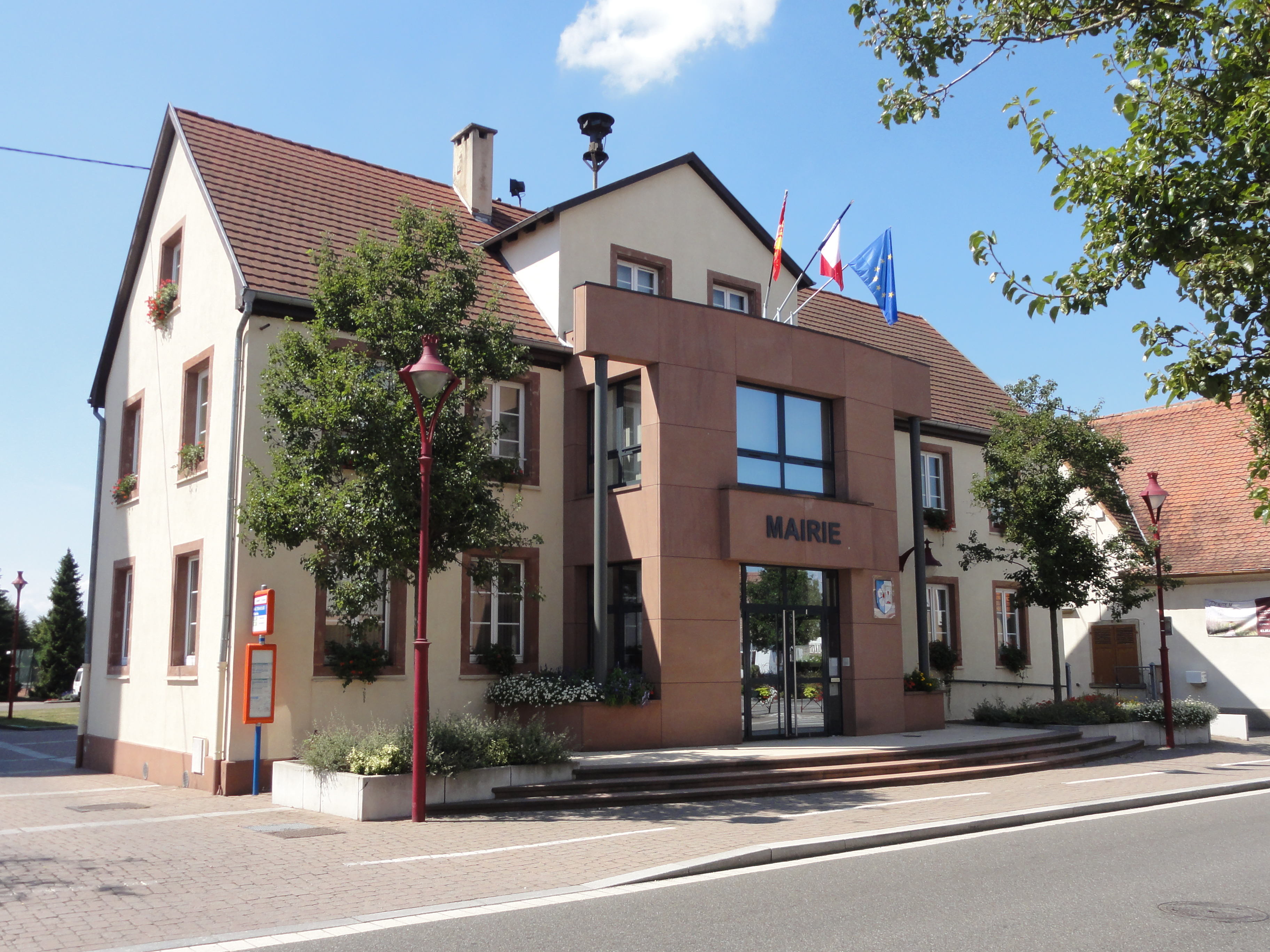 Alsace, Bas-Rhin, Kaltenhouse, Mairie-école (1852), rue Principale .